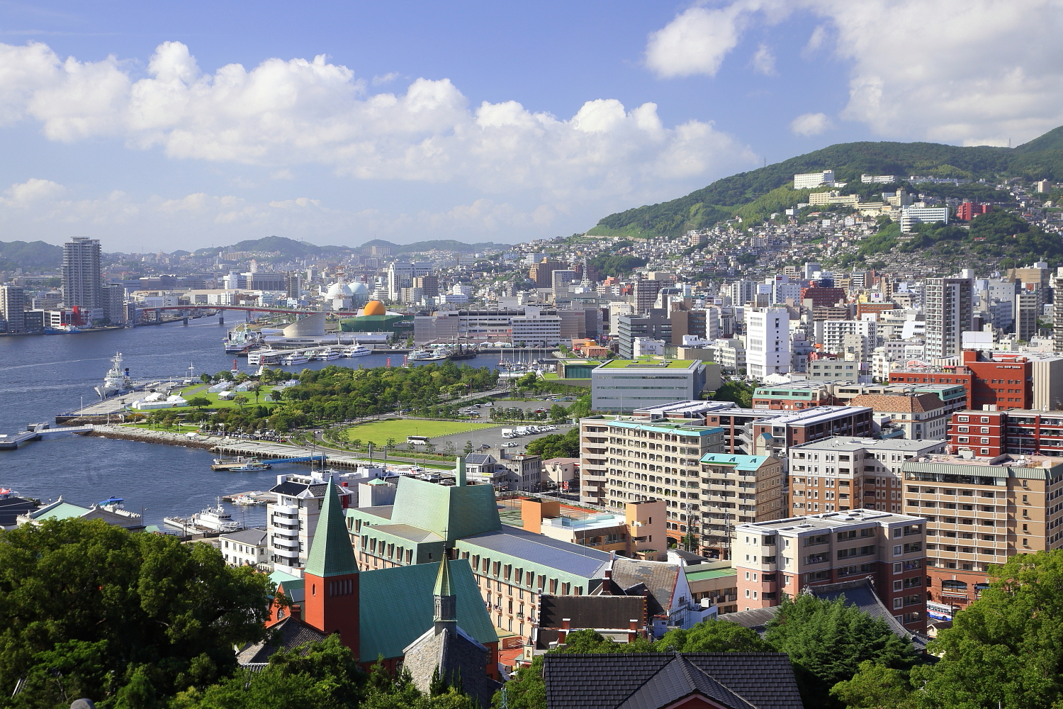 グラバー園から望む長崎市街地（長崎市、2014年（平成26年）7月）